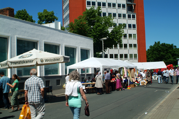 Scene vor der Merkez Camii (Moschee) in der Stiftstraße in Hannover am Tag der Kulturen; Blick in Richtung DGB-Gewerkschaftshaus